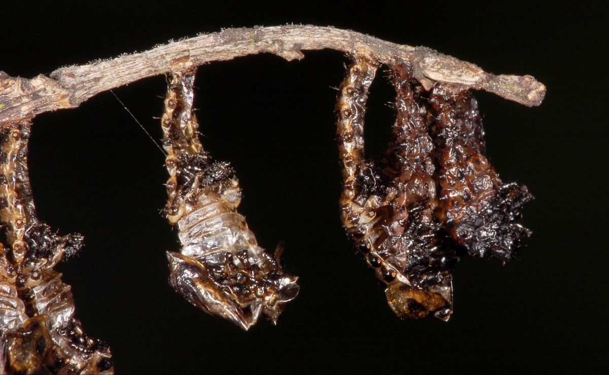 Gefleckter Weidenblattkäfer (Chrysomela vigintipunctata), Knüllwald, Hessen, Deutschland